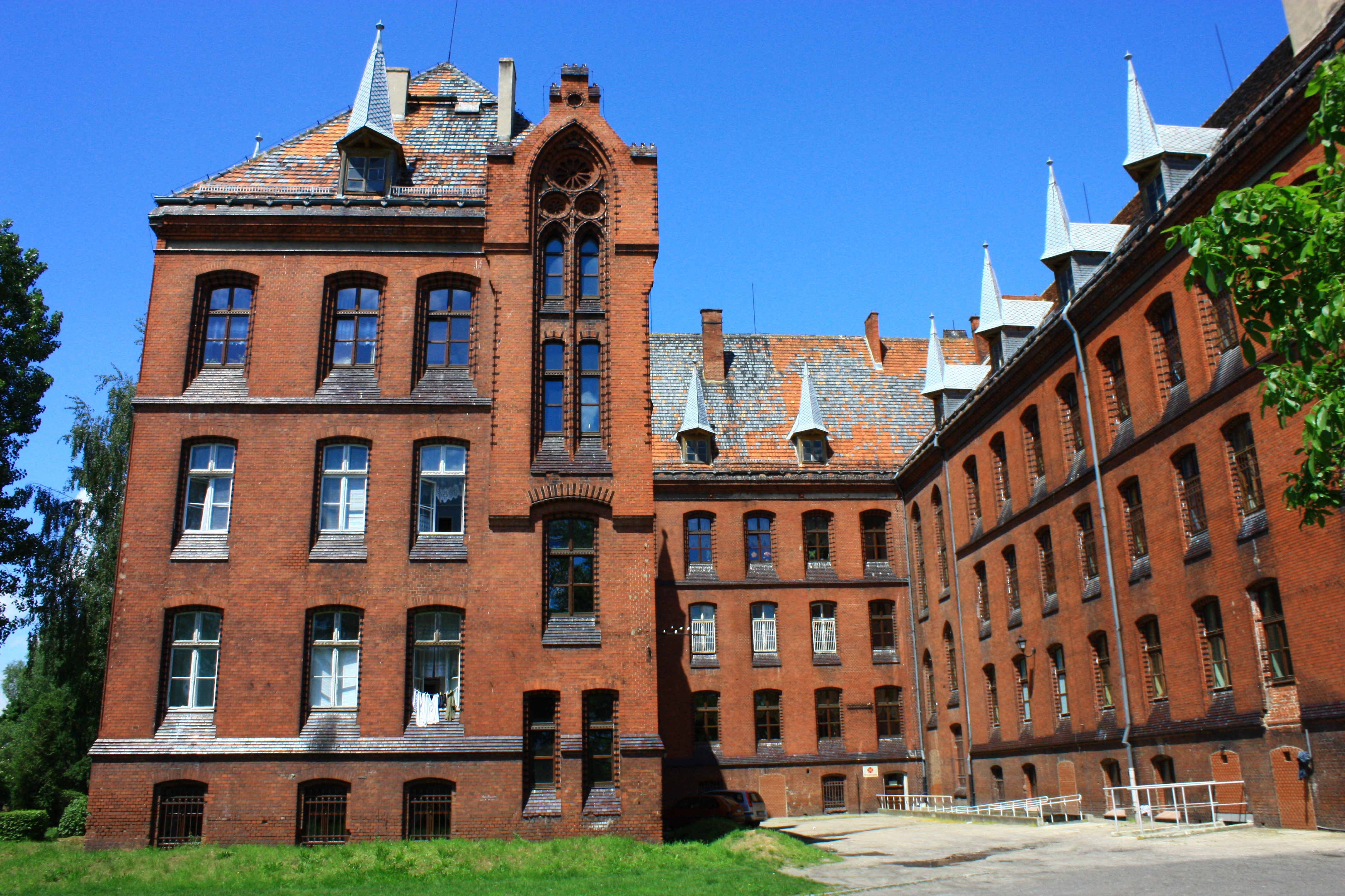 Dobroszyce, zakład dla sierot, ob. Specjalny Osrodek Szkolno-Wychowawczy Caritas, 1893 brak zabytków w zespole